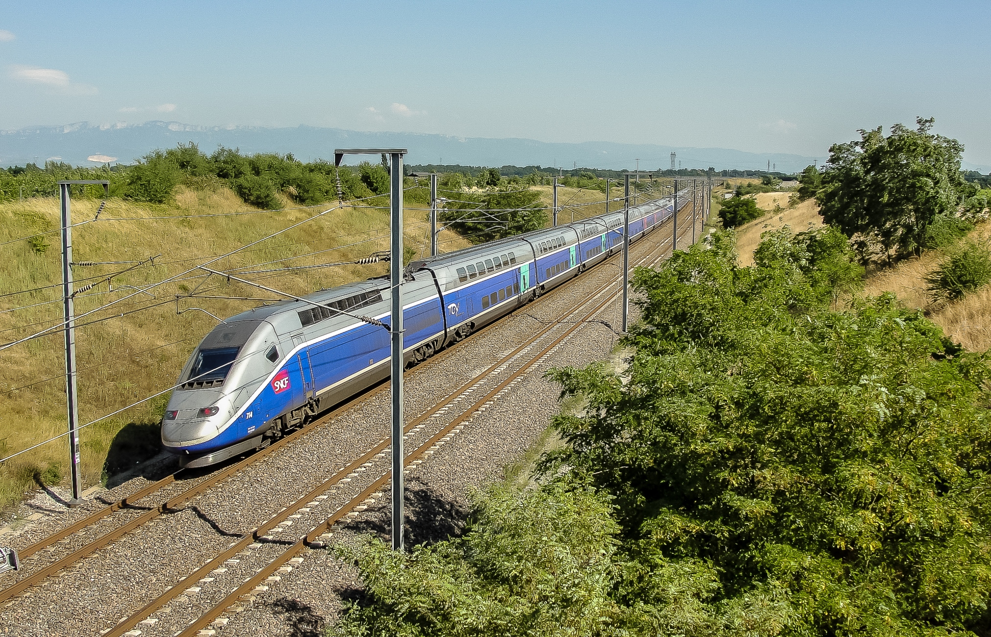 In de zomer van 2009 heb ik volop langs de zuidelijke TGV lijn gestaan. Bij het plaatsje Piedmont in de Rhône Alpes schiet TGV 714 richting Marseille met een snelheid van 300 km/h op de teller voorbij.